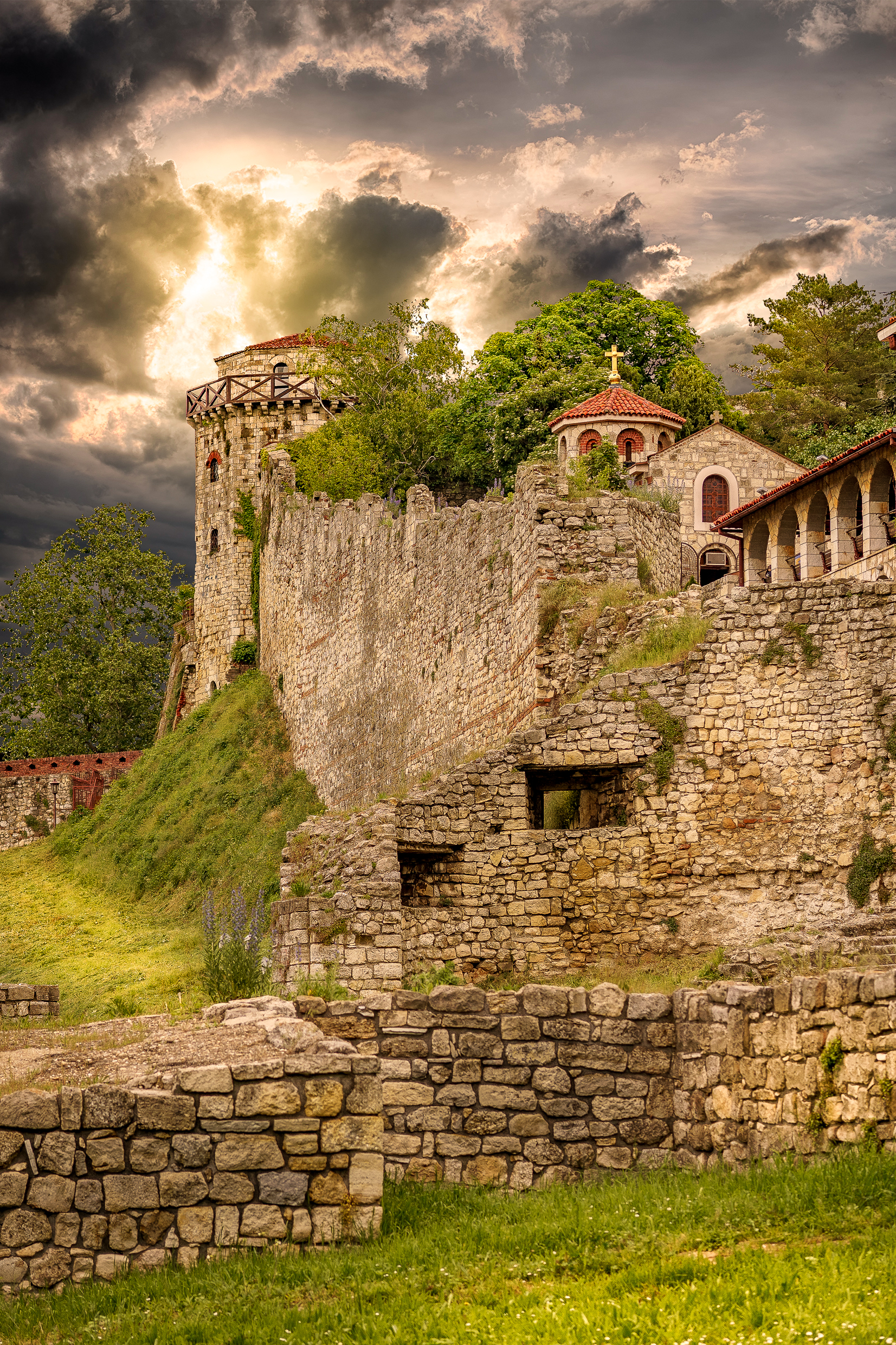 СП Поглед на Јакшићеву кулу са источне капије Калемегдана